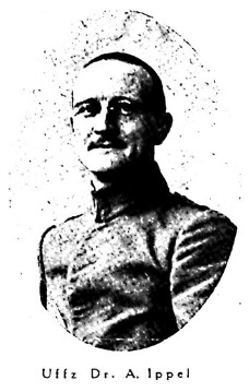 Альберт Иппель на Восточном фронте